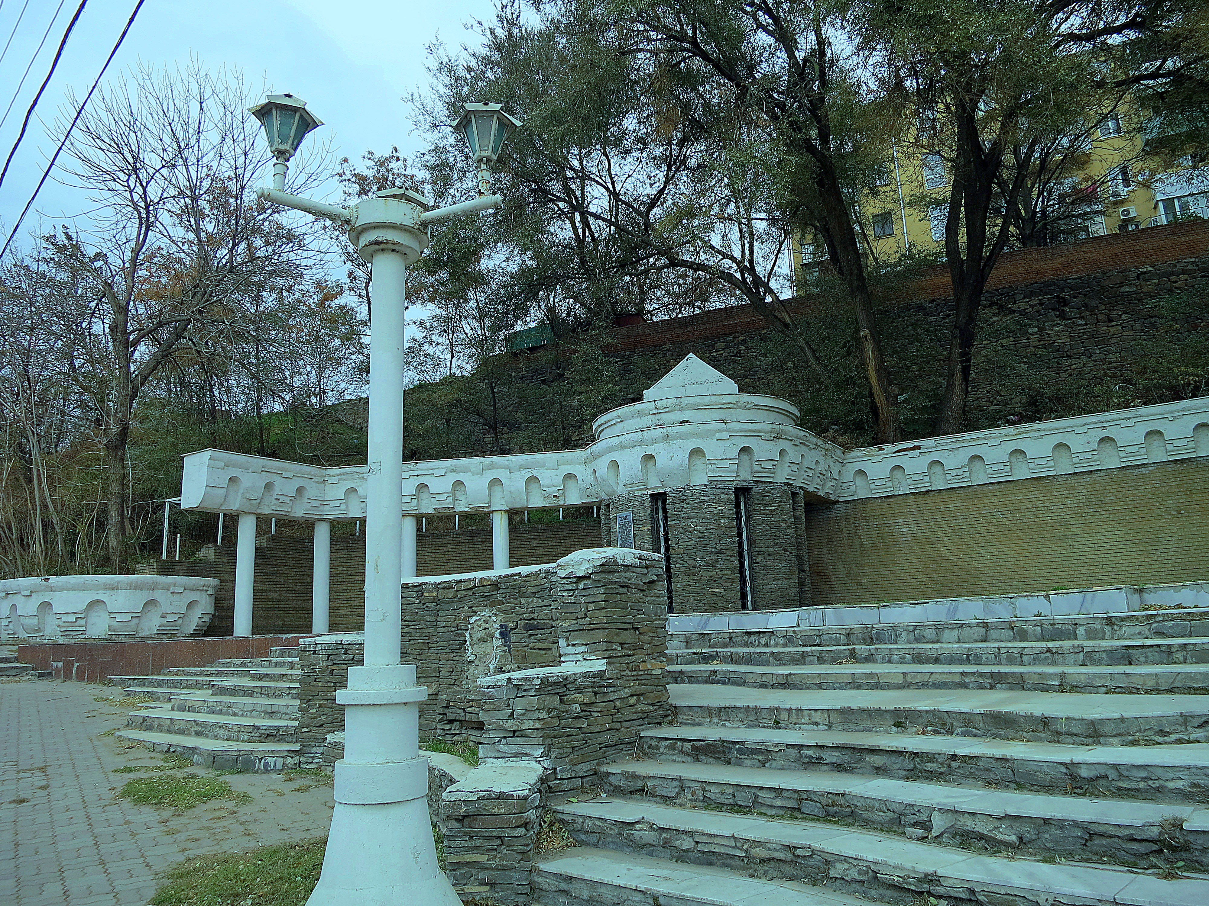 "Богатый источник" - место, связанное с основанием города: Кировский спуск, Береговая улица, Ростов-на-Дону, Ростовская область